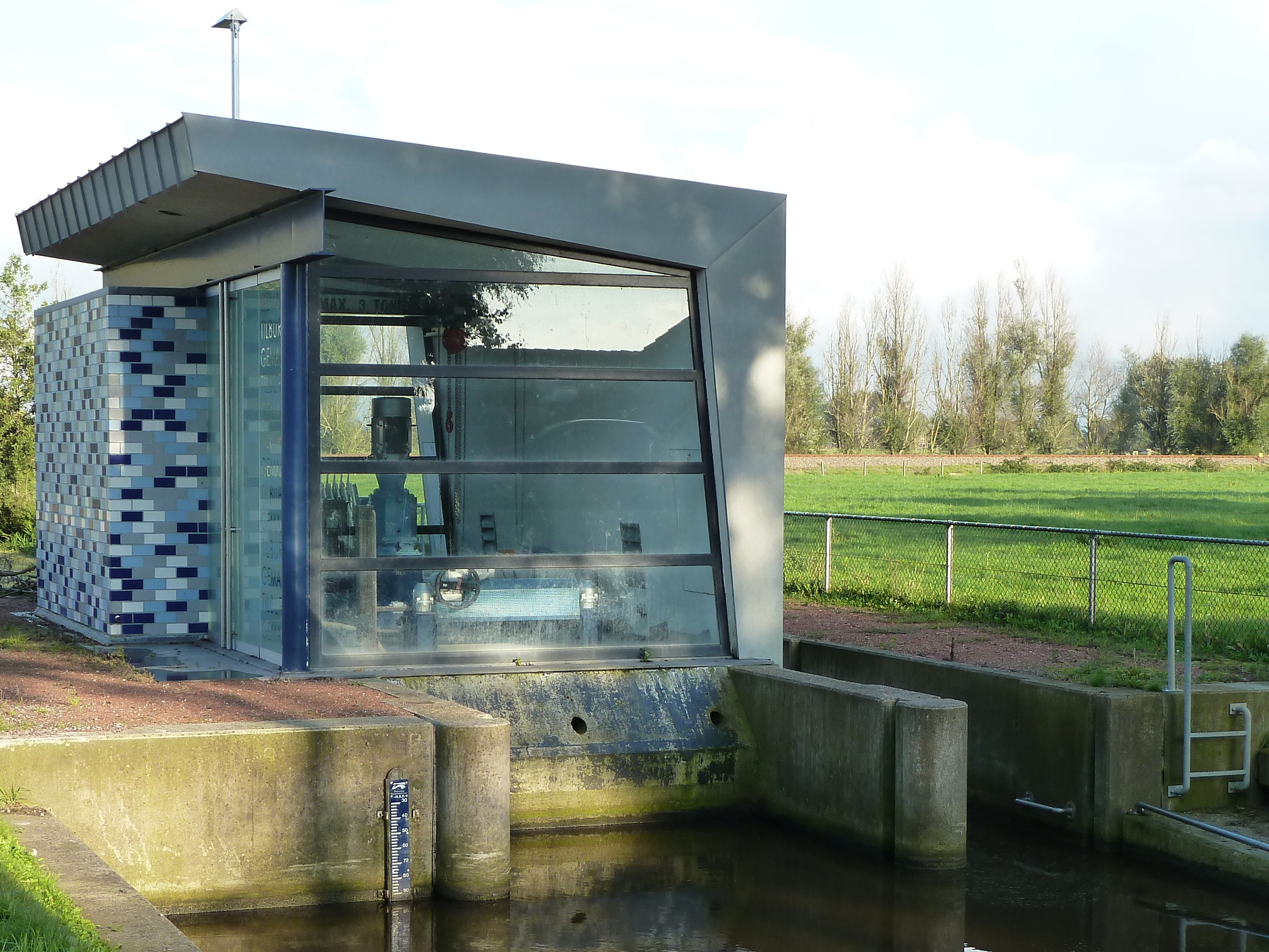 Gemaal Tilburg nabij Winsum (Groningen)